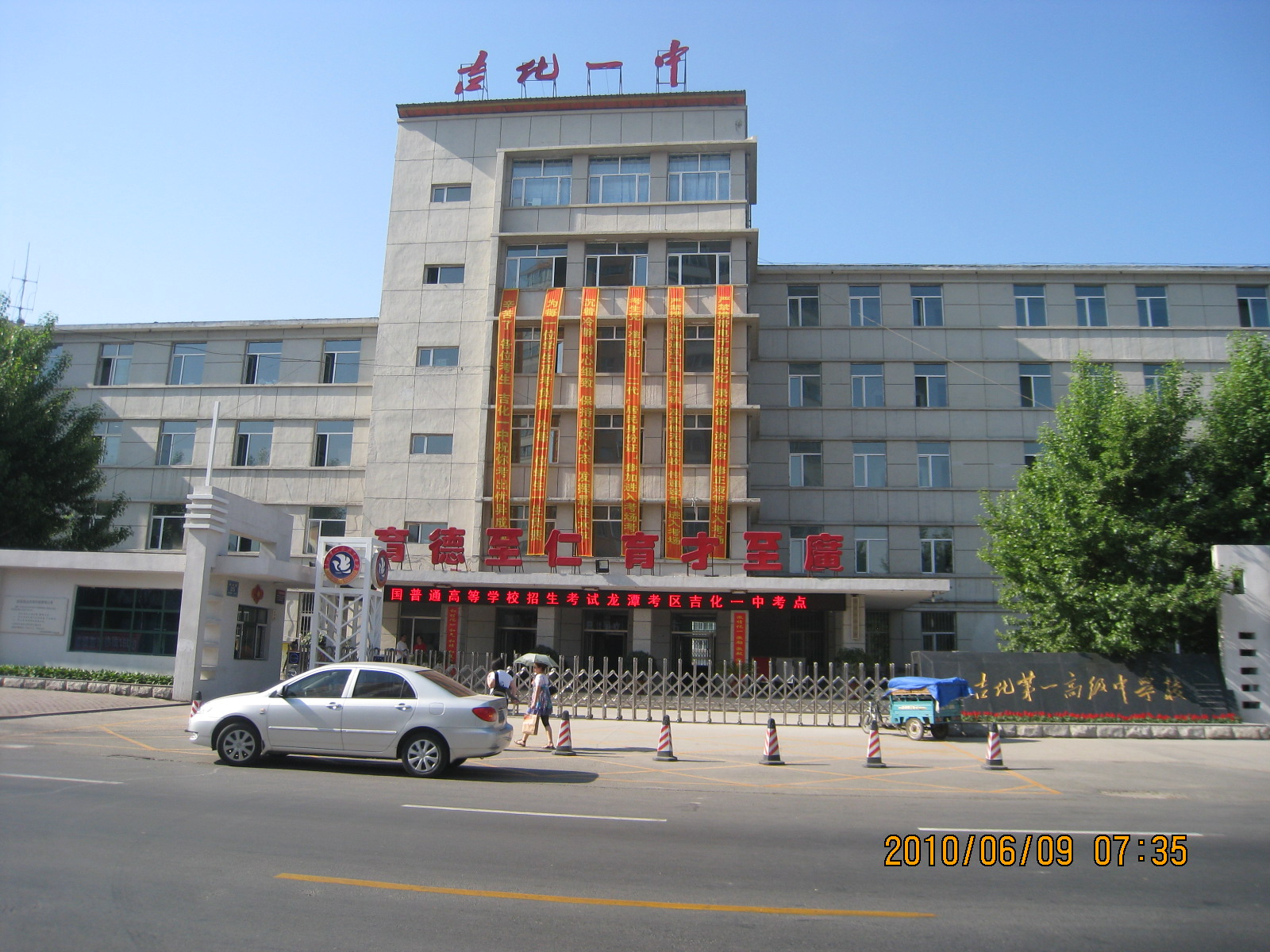 吉化一中